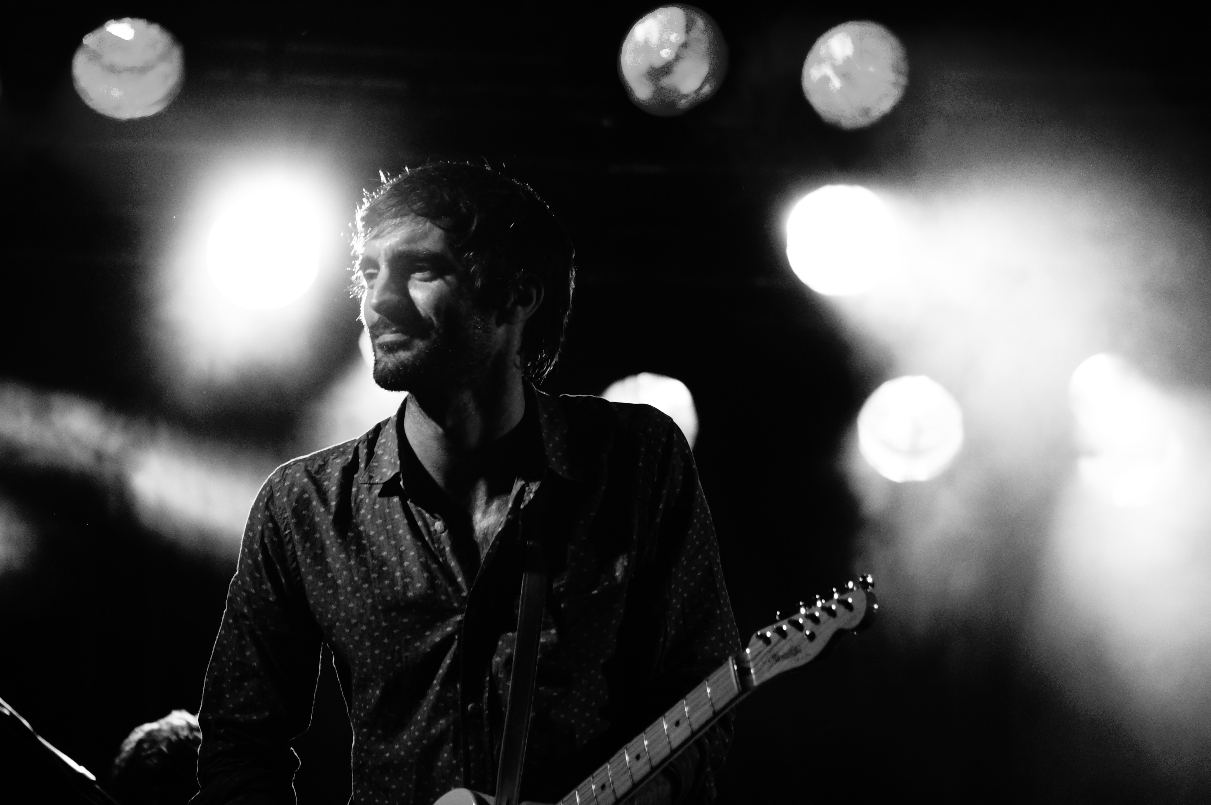 Talisco sur la Place Foch.